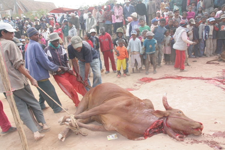 Alamady 2